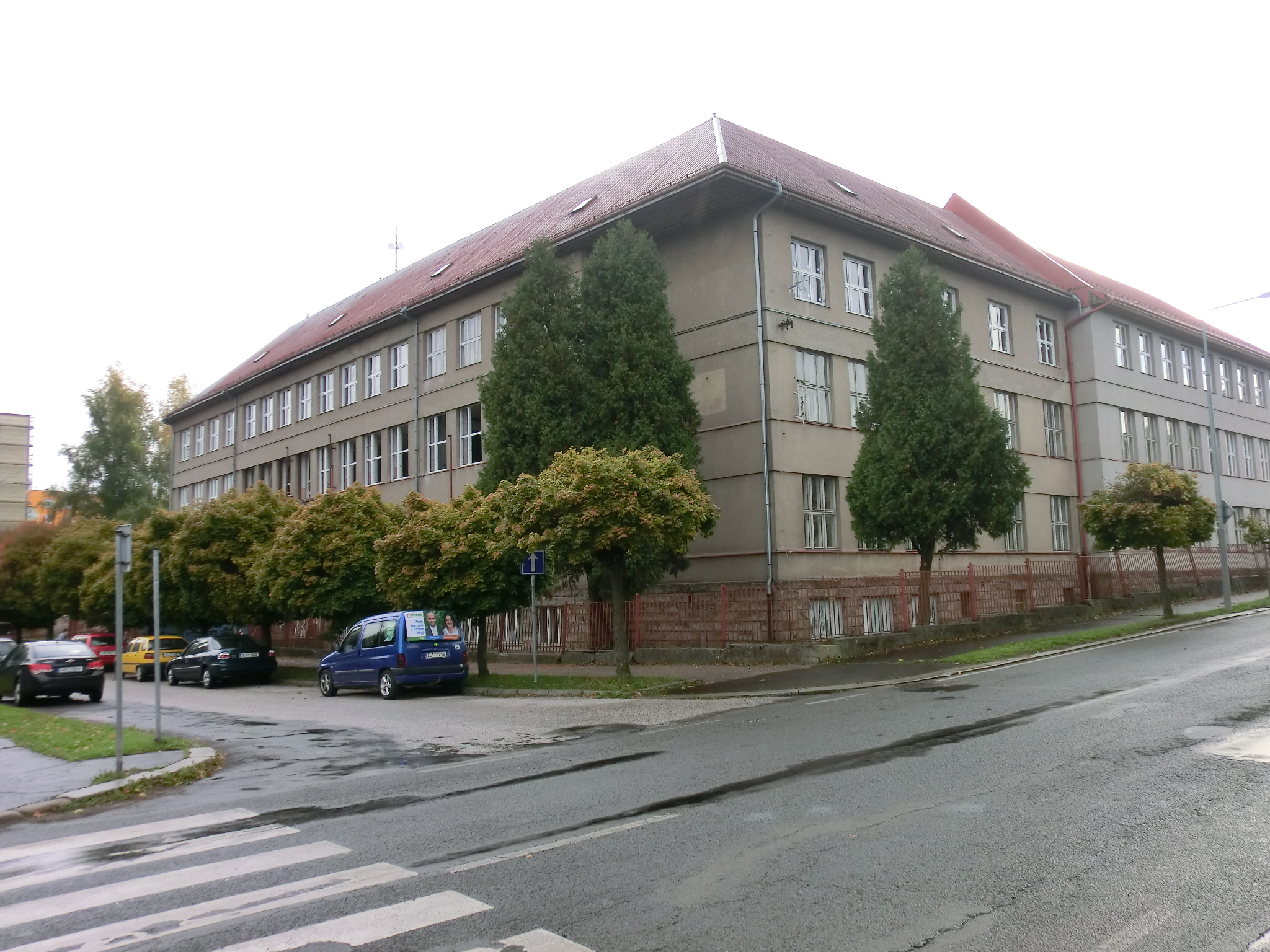 Výměna oken na budově bývalé SPŠT Jilemnice.